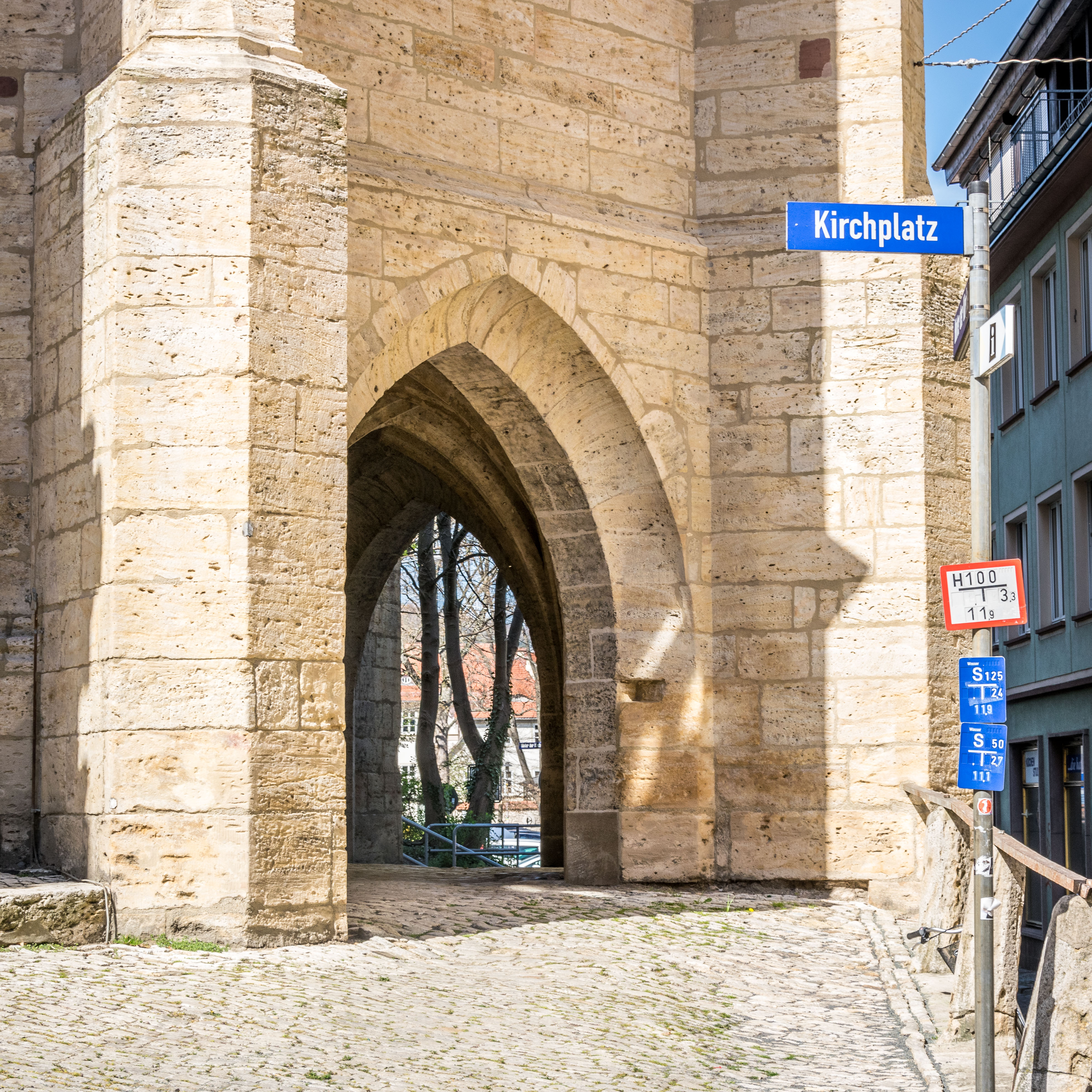 CC-BY 3.0